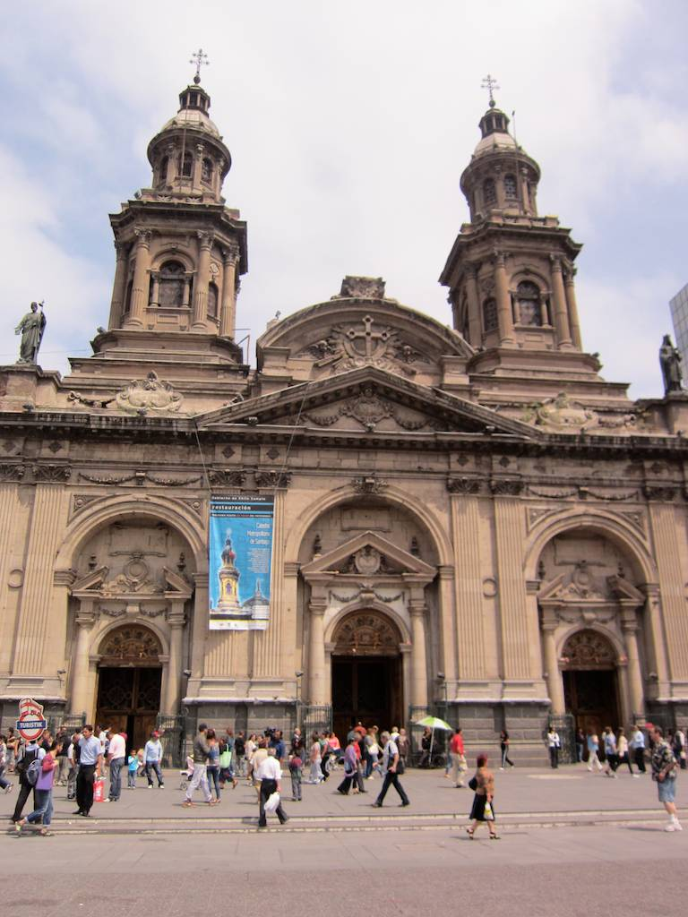 Catedral Metropolitana de Santiago, Chile